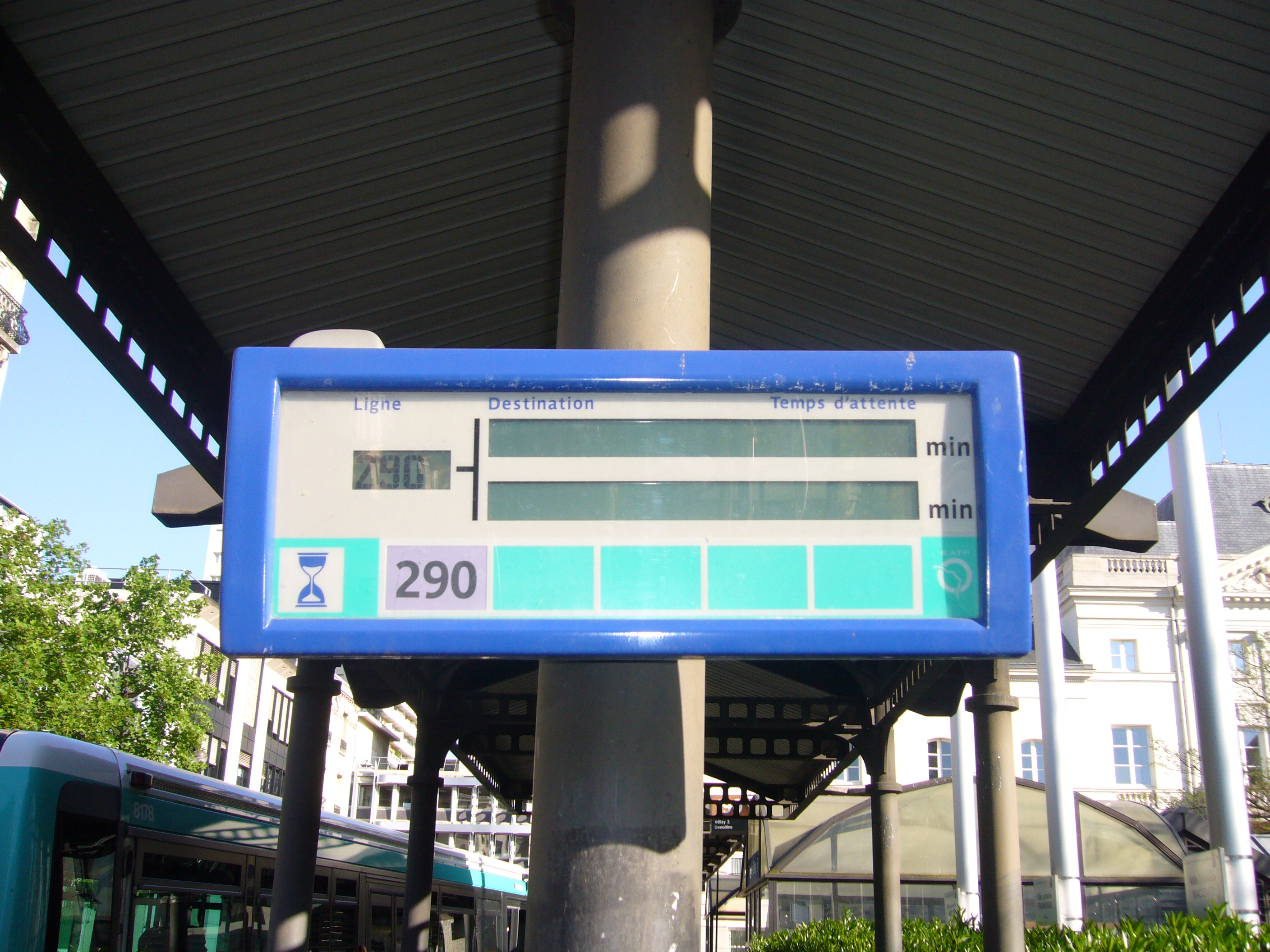 SIEL attaché à un poteau du terminus Mairie d'Issy de la ligne 290